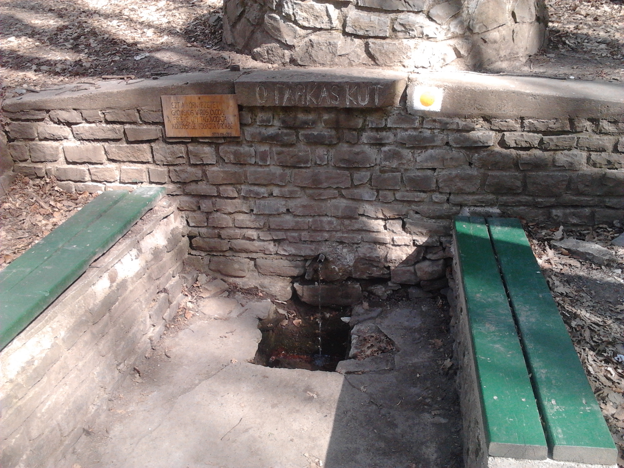 A Farkas-kút a Sástói tanösvény 15. és egyben utolsó állomása. A Farkas-kút vize biztosítja a Sástó vizét.